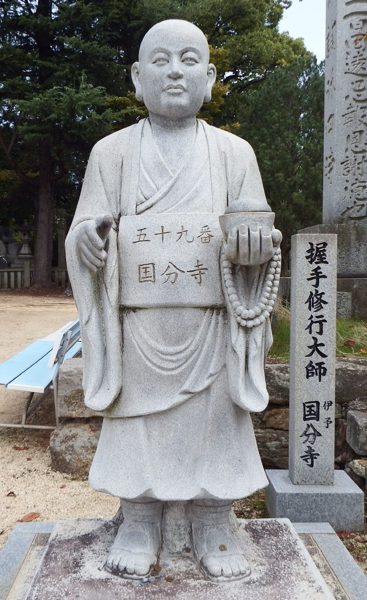 伊予国分寺の握手大師